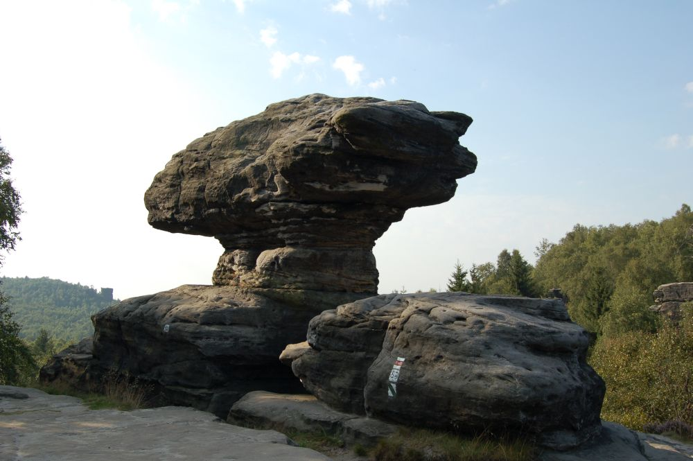 Česky: Skalní hřib